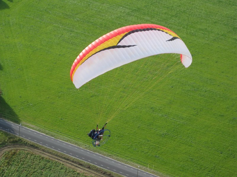 Motovarjuga lendamine